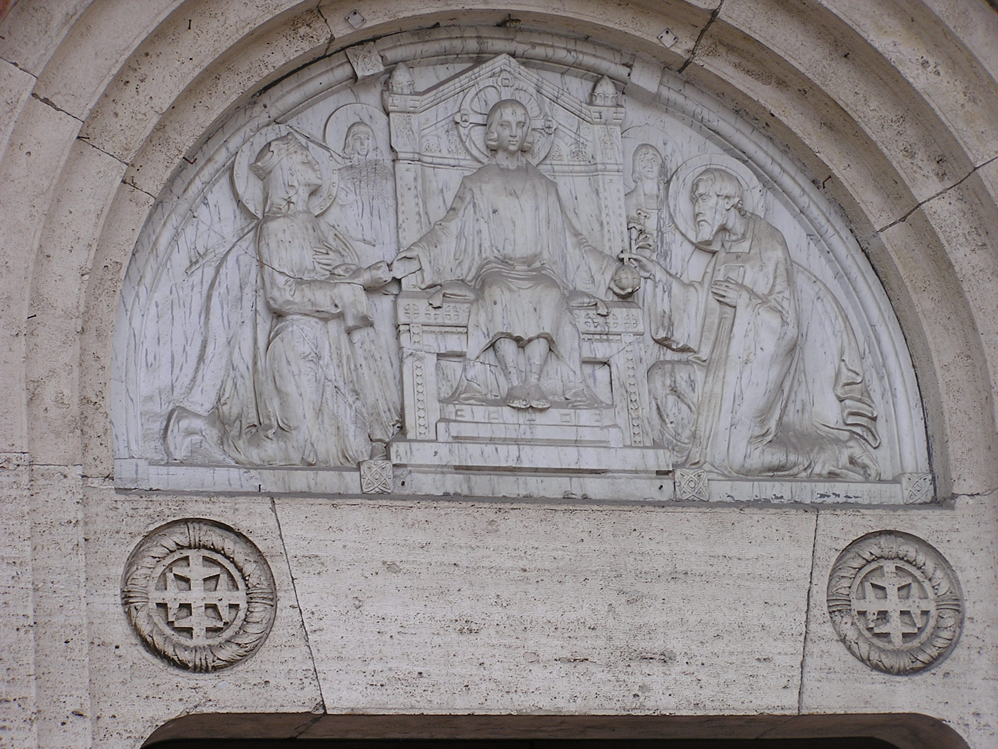 Scultura di Vittorio Merelli nella Chiesa della Sacra Famiglia